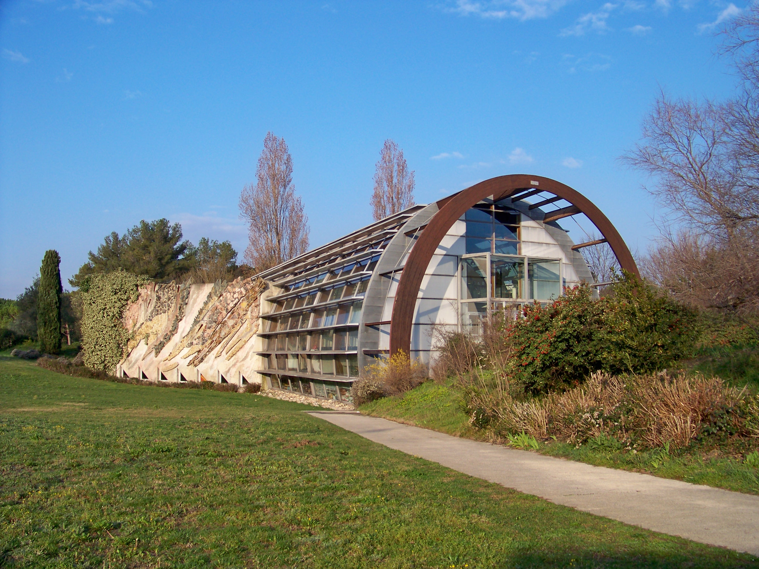 Département de prévention de l'ICM - Montpellier